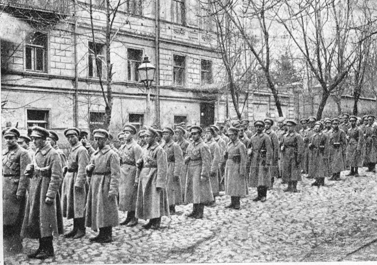 Січові стрільці в Києві, початок 1918 року